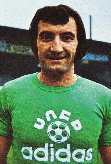 Gérard Farison en 1974, 'Ageducatifs Football 1974 - 1975', Panini figurina.